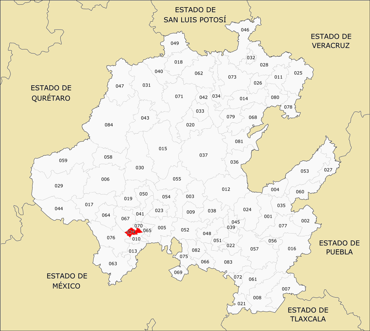 Municipios de Hidalgo